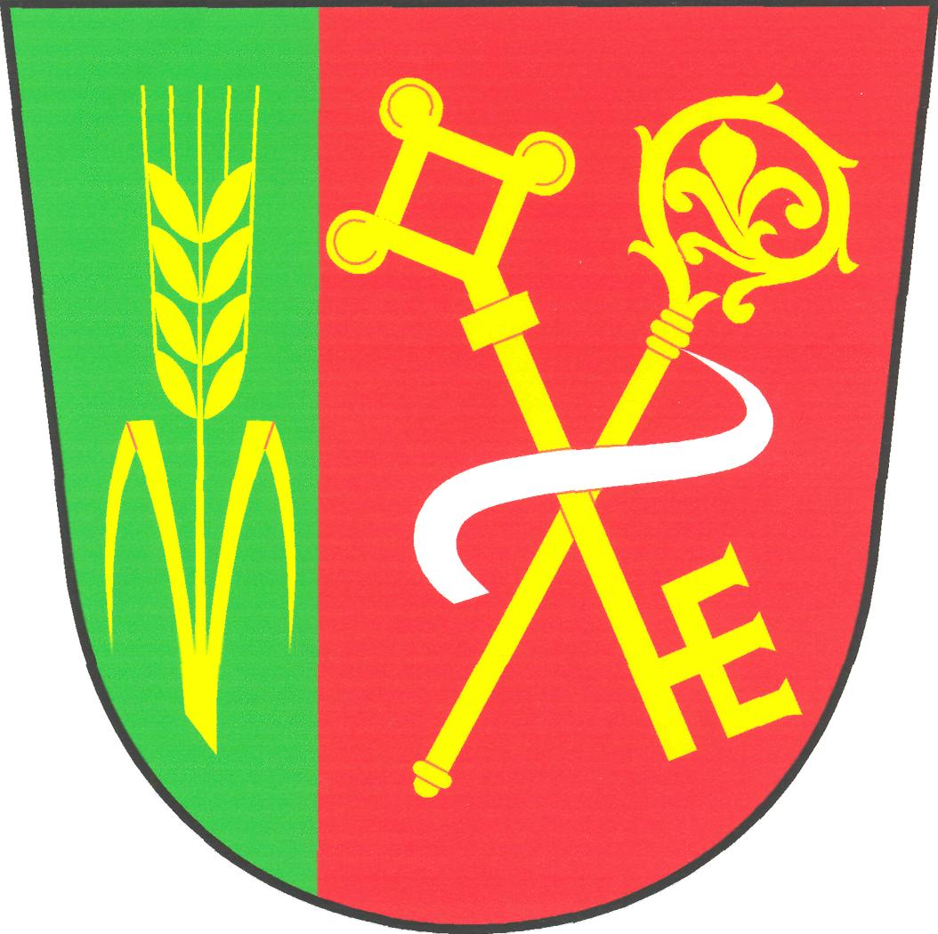 Znak obce Jílovice (okres Hradec Králové)